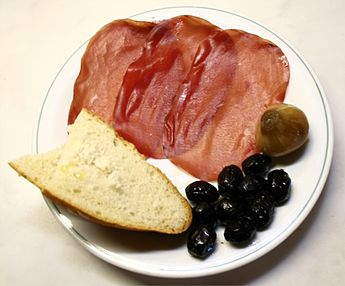 bresaola